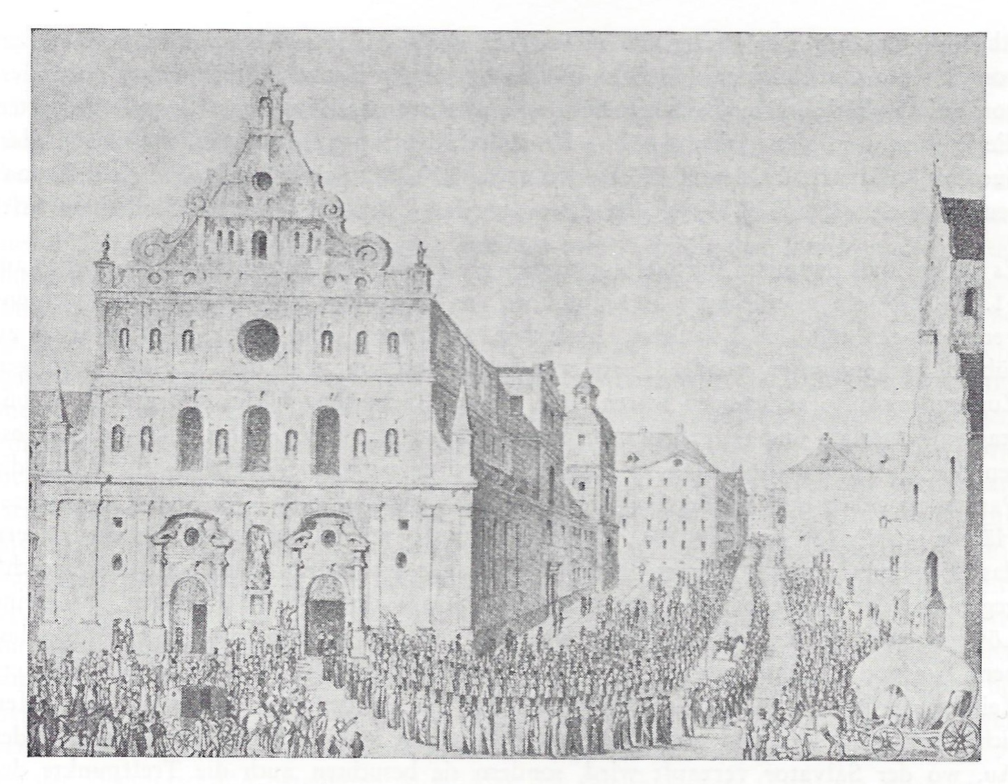 Lithographie vom Einzug der Landshuter Professoren und Studenten in die Universität zu München